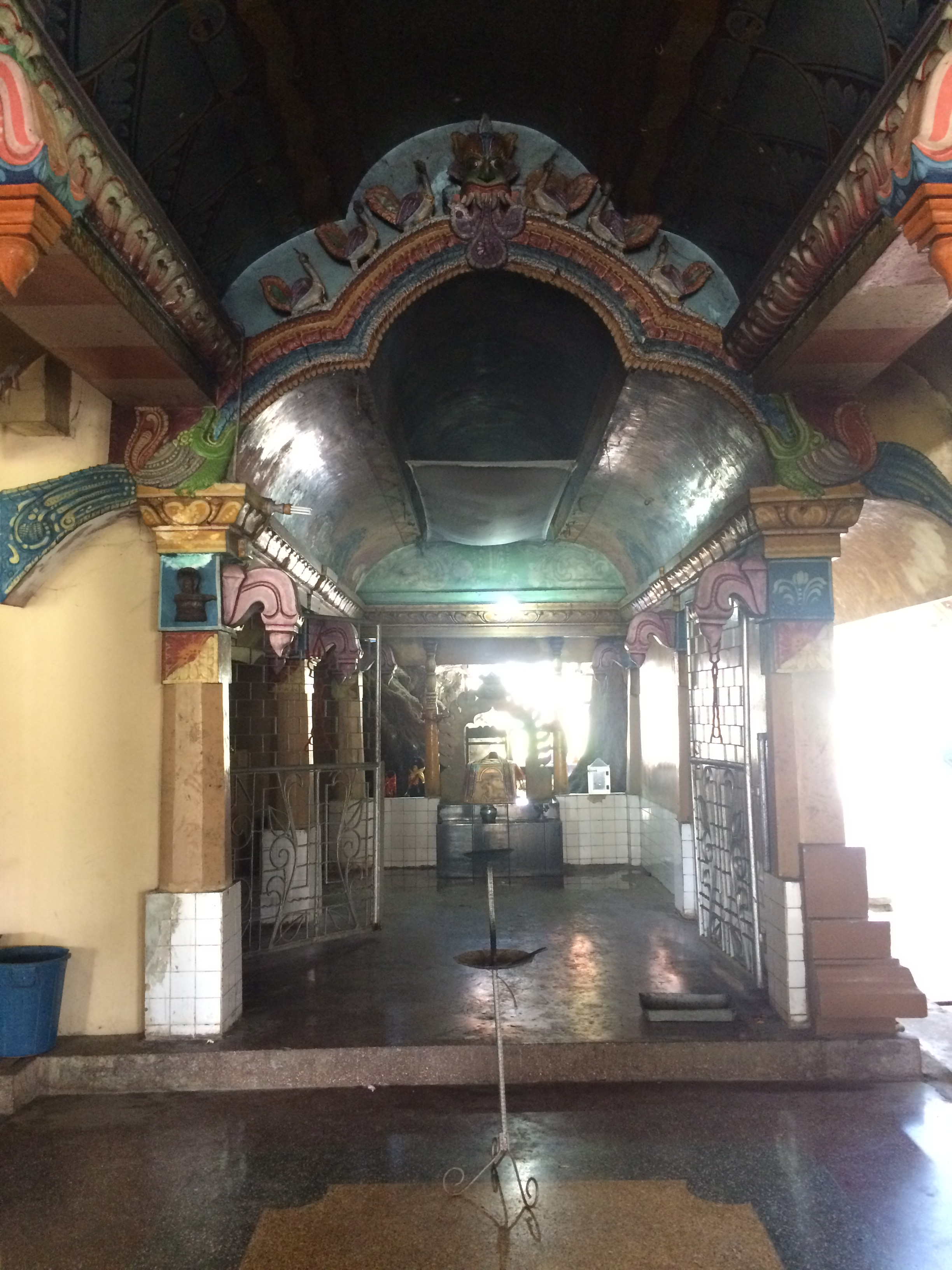 பத்திரகாளி சமேத வீரபத்திரர் கோயில்